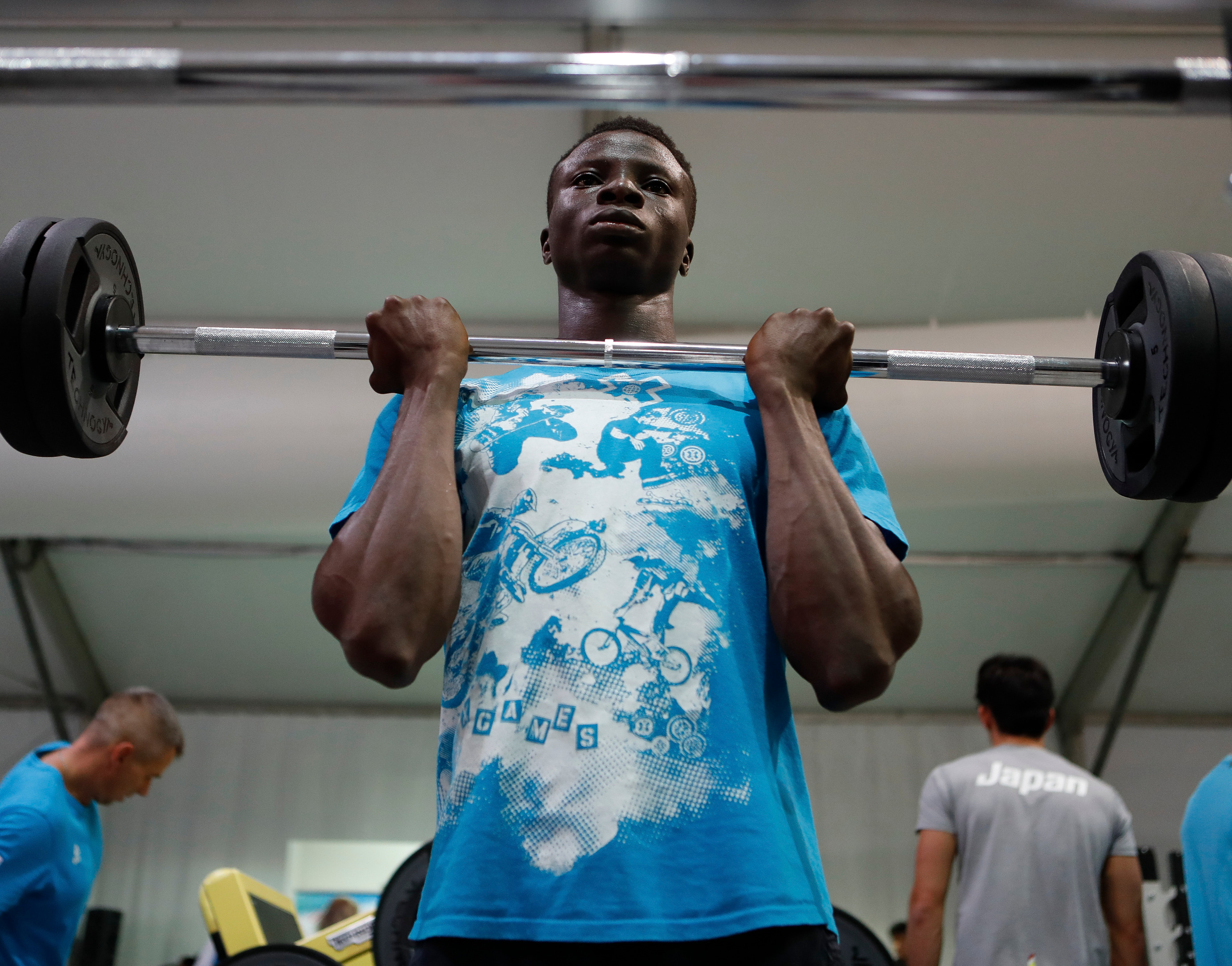 Rio de Janeiro - Ishmail Kamara, de Serra Leoa, treina na academia da Vila Olímpica dos Jogos Rio 2016 (Fernando Frazão/Agência Brasil)